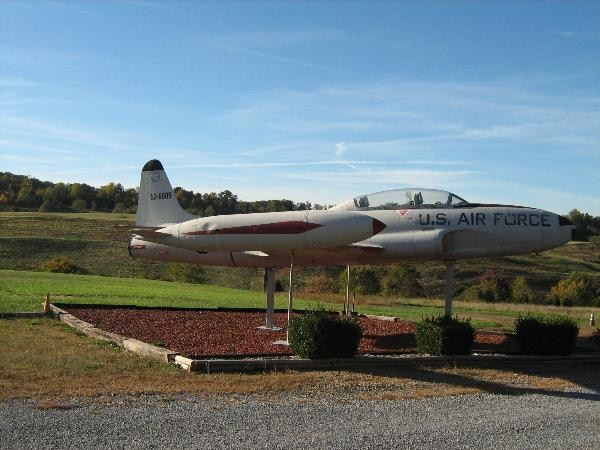 t-33a jet